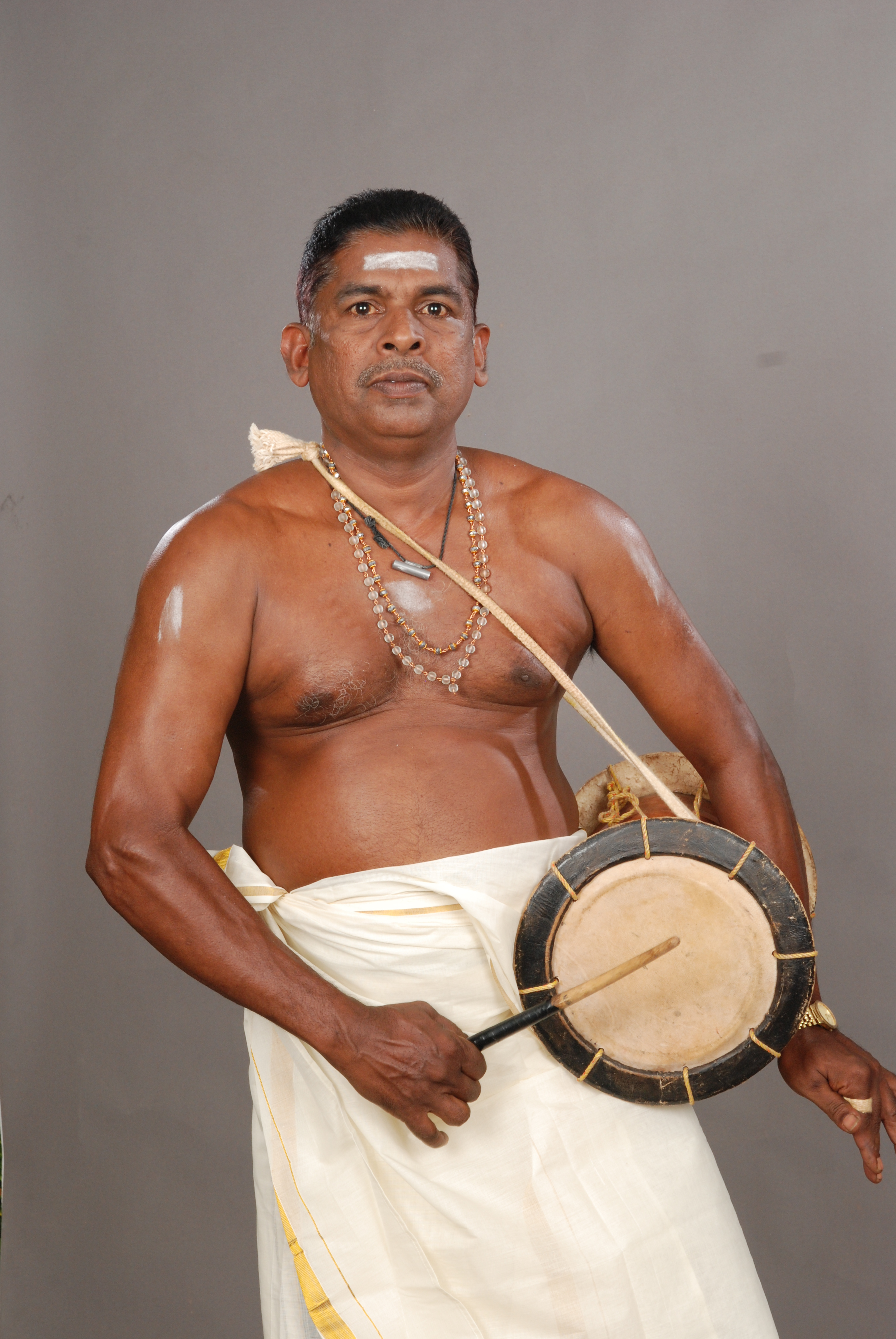 Peethambaran aasan